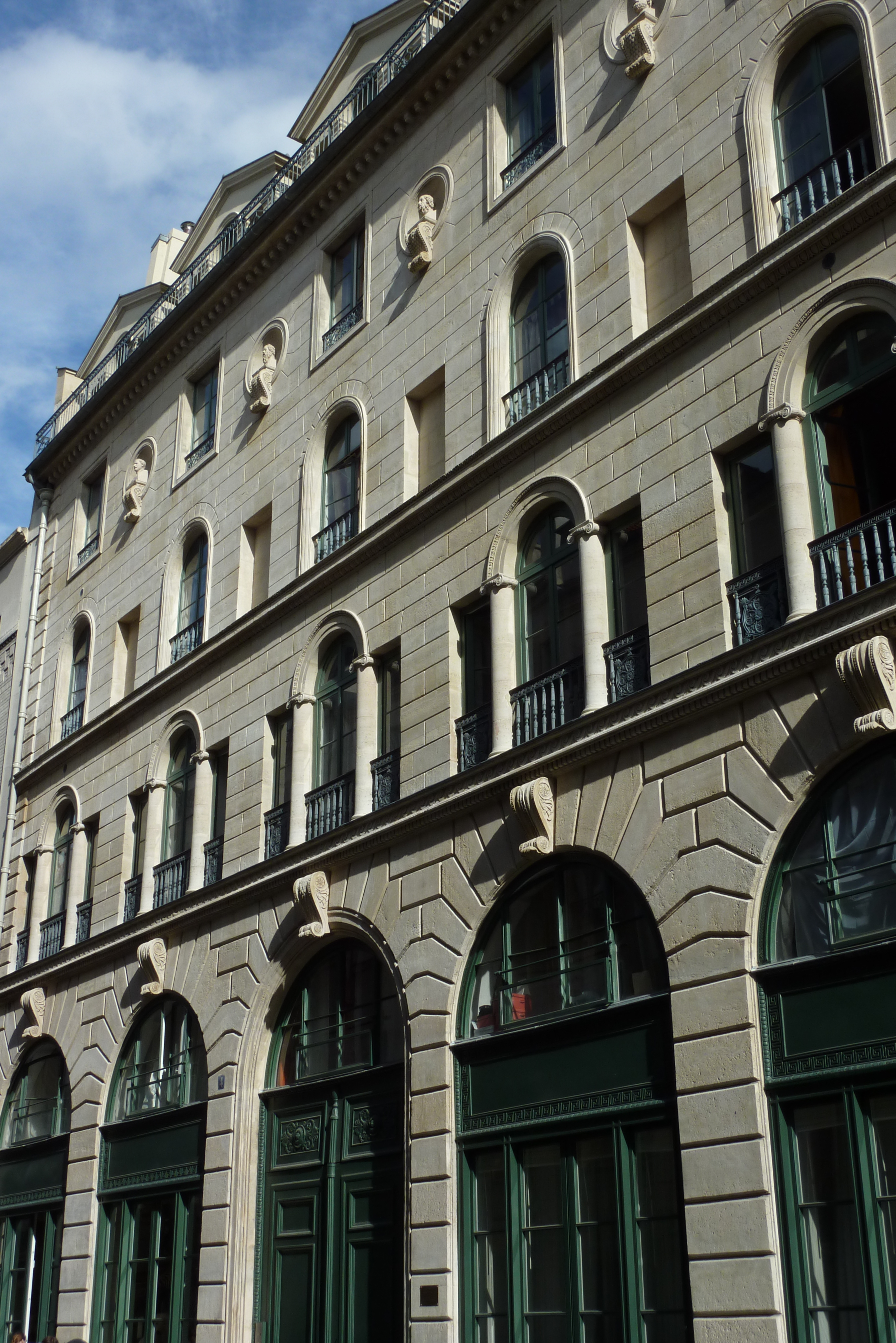 Fassade zur Straße des Hauses 4, rue d'Aboukir in Paris (2. Arrondissement), Architekt: Jules de Joly